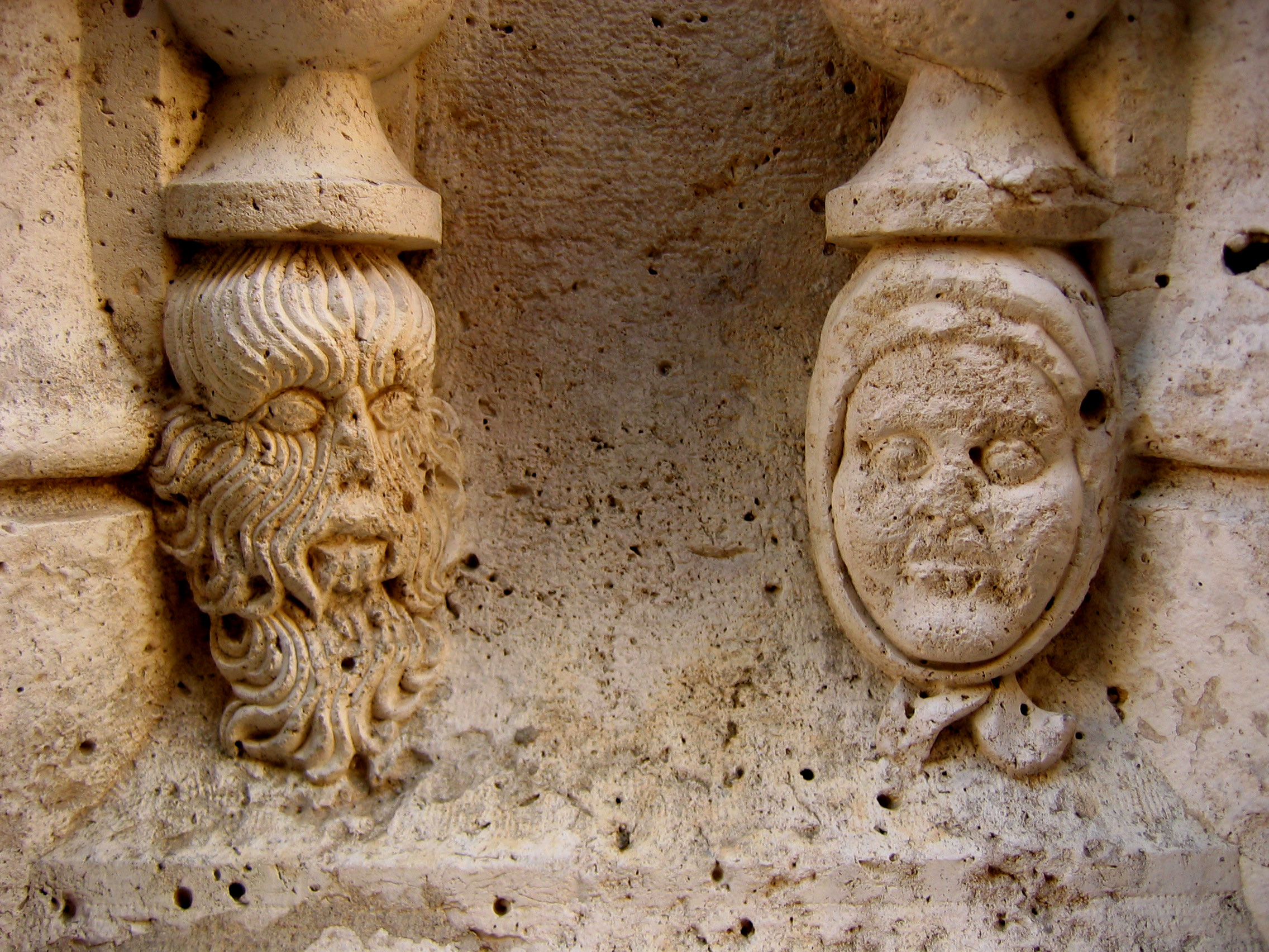 Alegoría de un hombre salvaje (homo sylvestris)frente al hombre civilizado en la fachada de la Lonja de la Seda, edificio del gótico civil en Valencia, siglo XVI. Autor:Chosovi